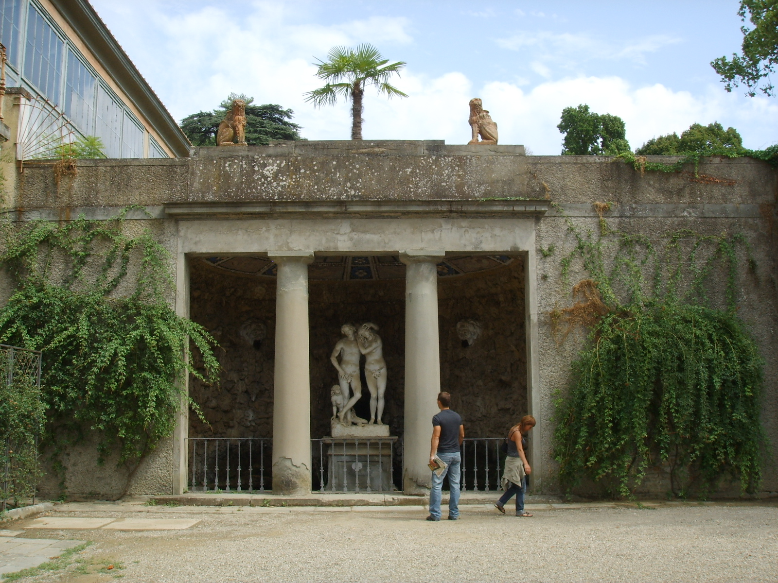 Boboli, Grotta di Adamo ed Eva